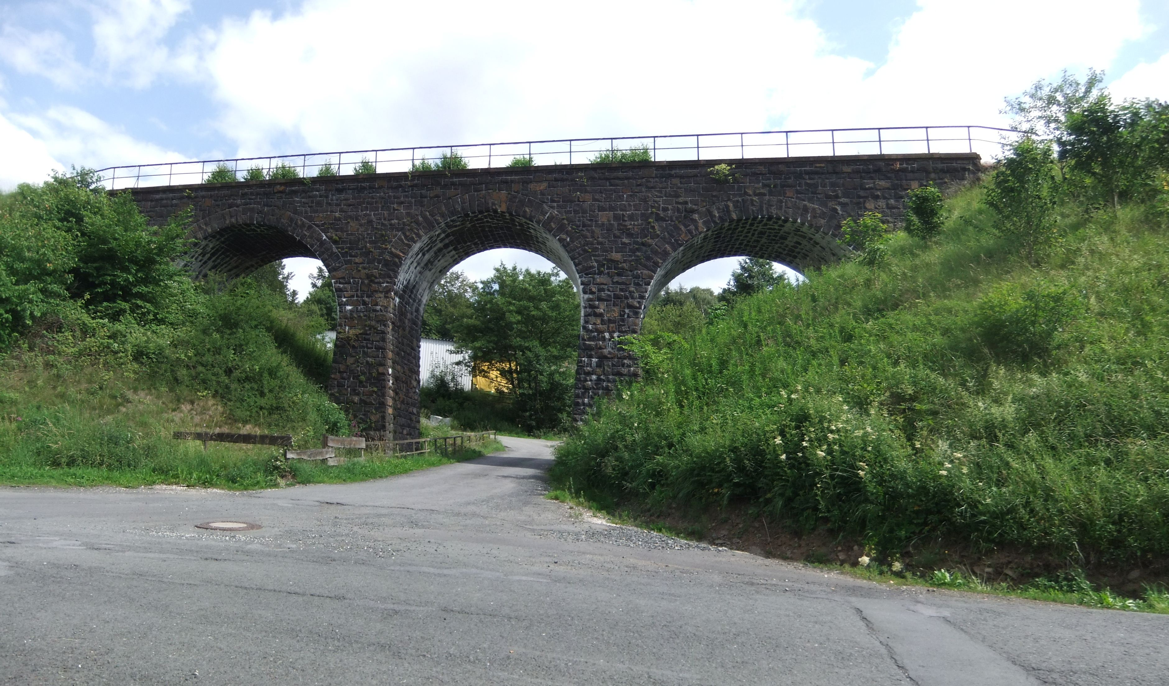 Dreibogiges Eisenbahnviadukt bei Frechenhausen (Winkelstraße)